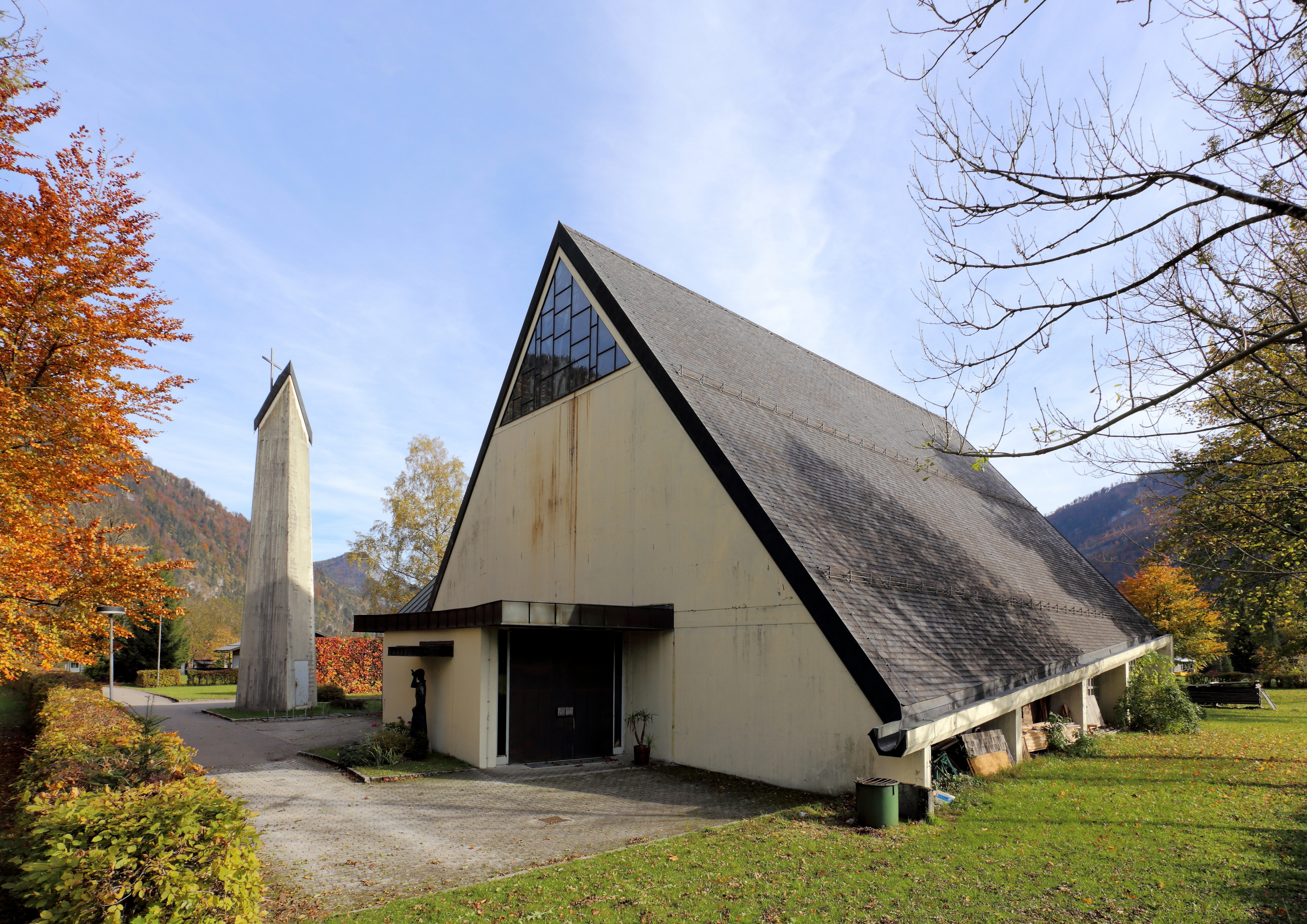 Südwestansicht der katholischen Filialkirche in Roith, ein Ortsteil der oberösterreichischen Marktgemeinde Ebensee. Die Kirche wurde nach den Plänen des Gmundner Architekten Helmut Reischer unter Beratung des Kunstprofessor Herbert Muck ab 1967 errichtet und am 19. Jänner 1969 eingeweiht.